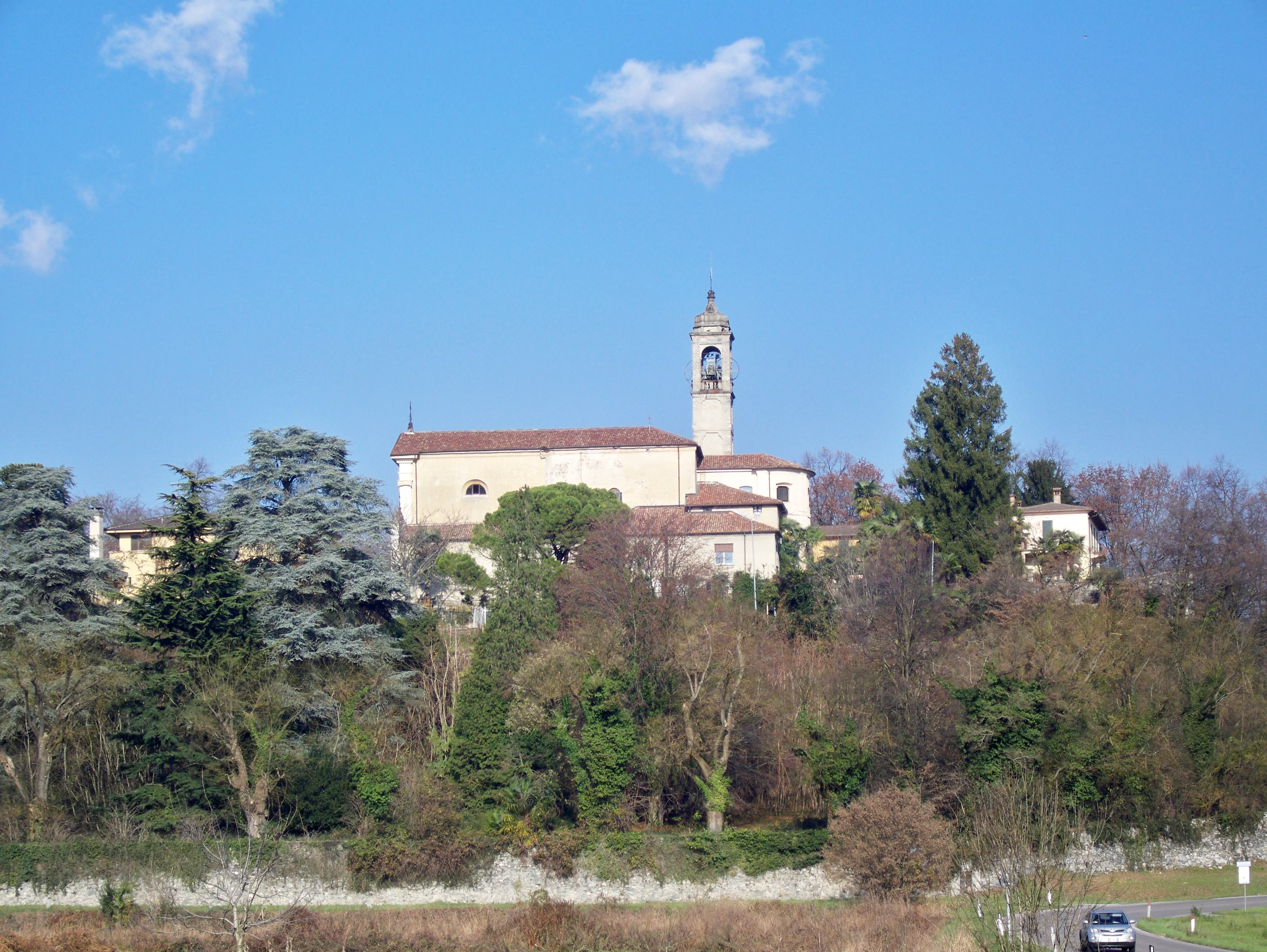 Chiesa parrocchiale di Orsenigo, Italia